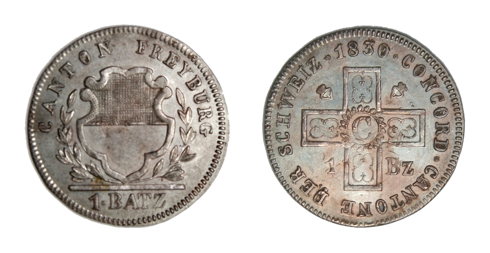 1 Batzen aus dem Jahr 1830 aus dem Kanton Freiburg